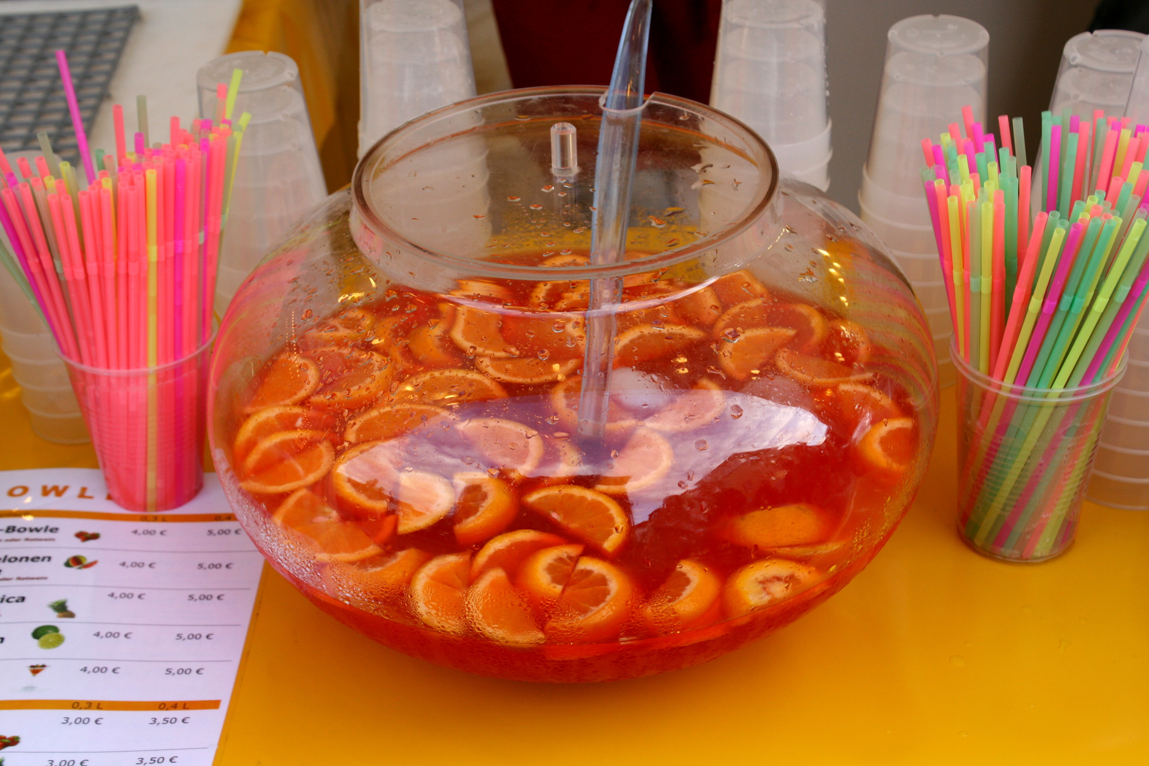 1. Hückeswagener Bierbörse, Bahnhofstraße und Bahnhofplatz in Hückeswagen